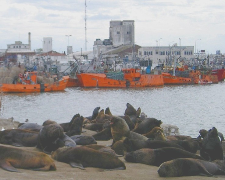 Mar del Plata (Argentina). Puerto. Lobería